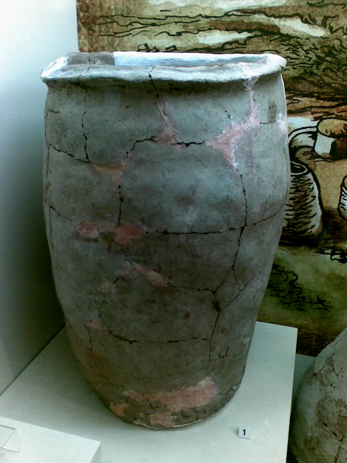 Əlikoməktəpədən tapılmış saxsı qab